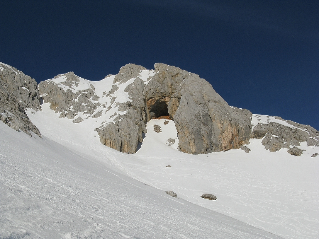 Sul sentiero dalla val Krma